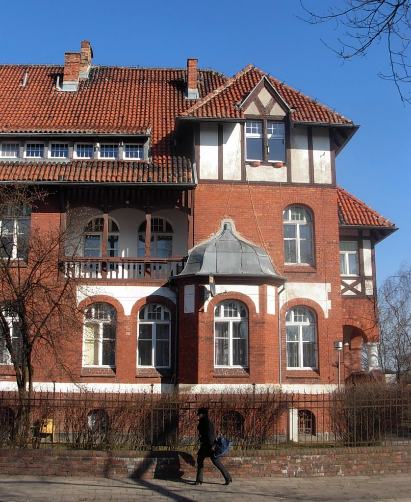 Instytuty Rolnicze w Bydgoszczy